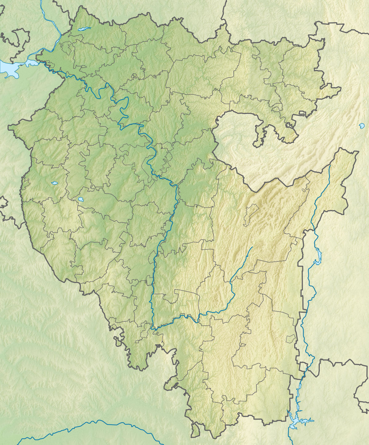 Физическая карта Республики Башкотостан Проекция — равноугольная. Параметры шаблона (координаты краёв): |top = 56.6 |bottom = 51.5 |left = 53.0 |right = 60.2